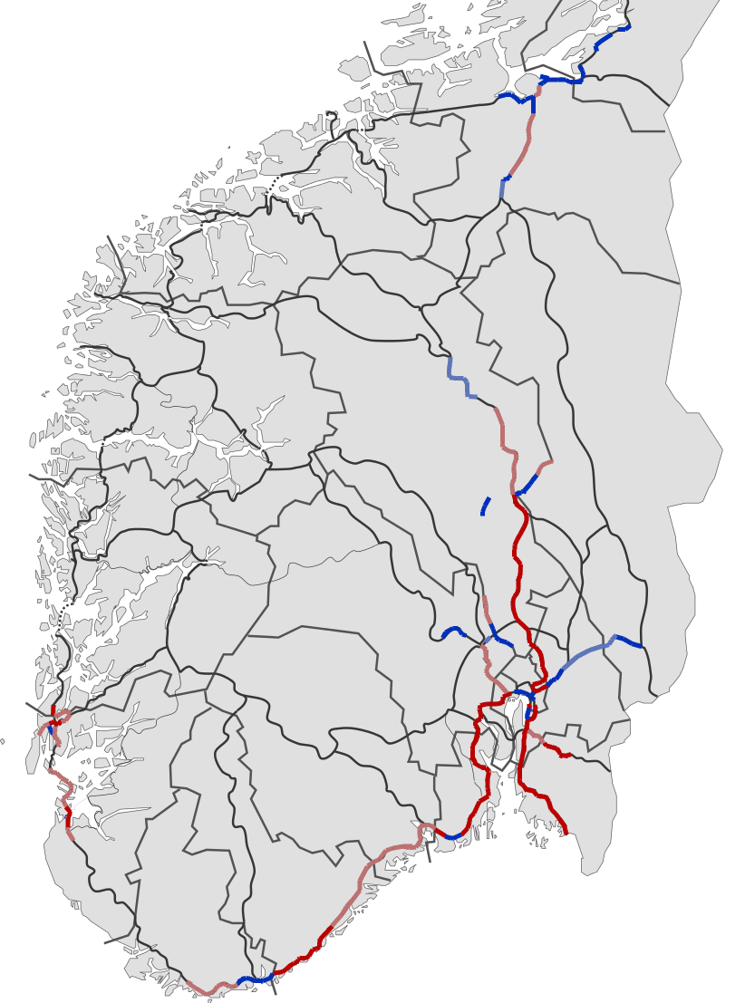 Motorveier og motortrafikkveier i Norge. Strekningene er fargekodet: RØD: Motorvei BLÅ: Motortrafikkvei LYS RØD: Planlagt motorvei LYS BLÅ: Planlagt motortrafikkvei